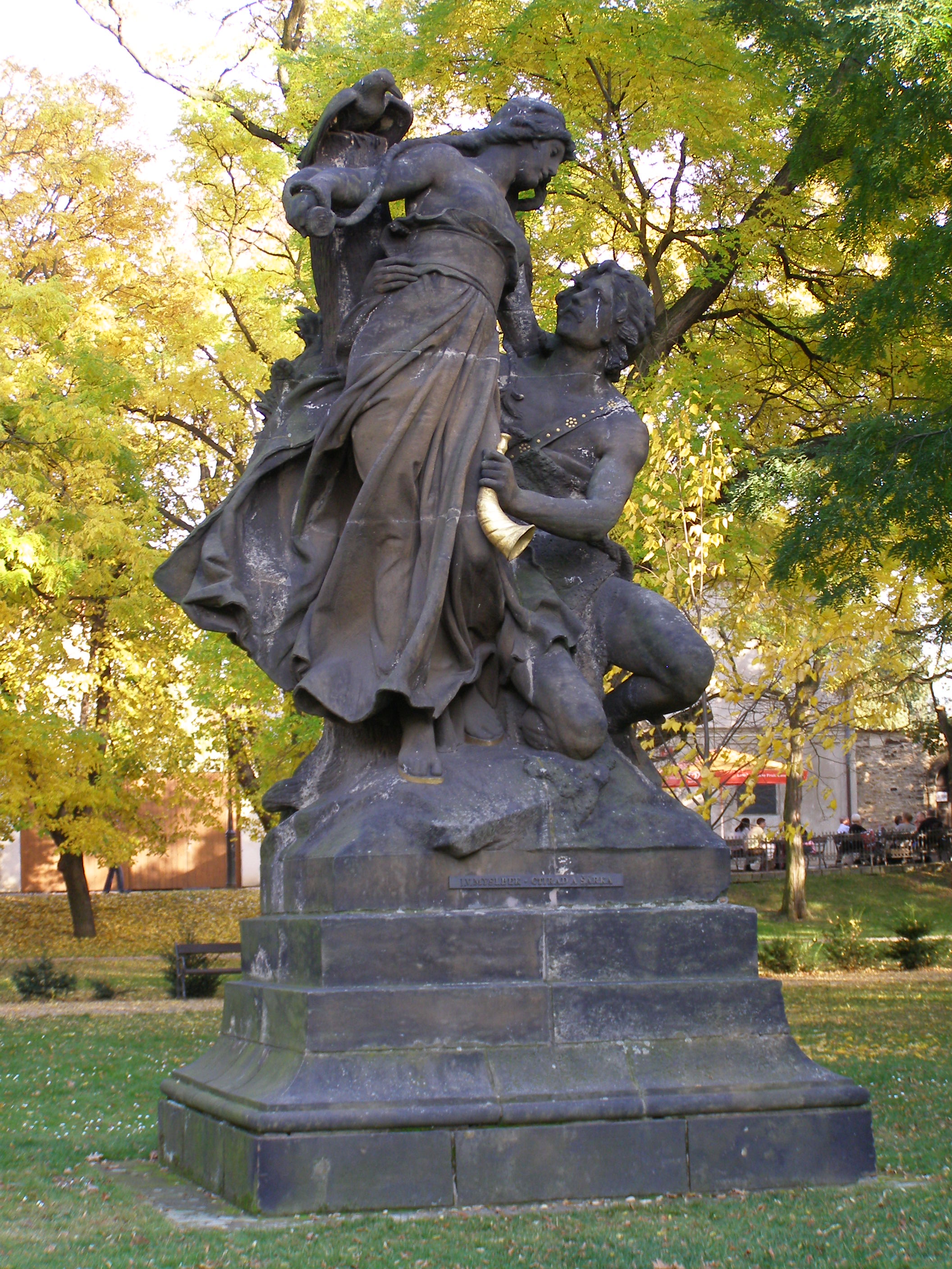 Pevnost Vyšehrad, Praha 2-Vyšehrad, Soběslavova 14/1, V pevnosti 16/2, 35/11, K rotundě 16/3, 81/6, 82/8, 90/12, 91/14, 92/16, 100/10, Štulcova 89/1, 102/2, 69/3